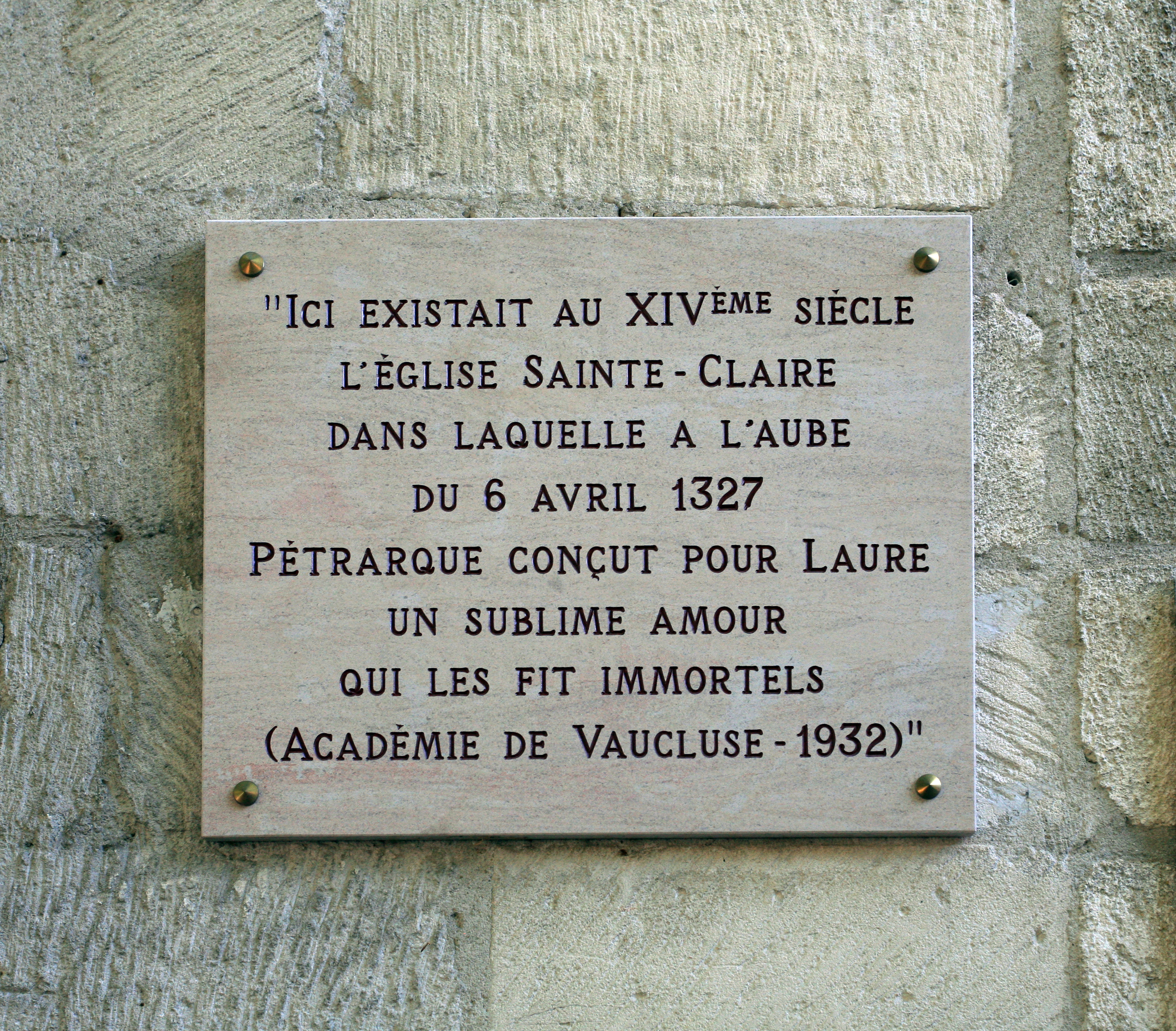 Plaque déposée sur la façade du Couvent Sainte-Claire, Avignon, Vaucluse, France